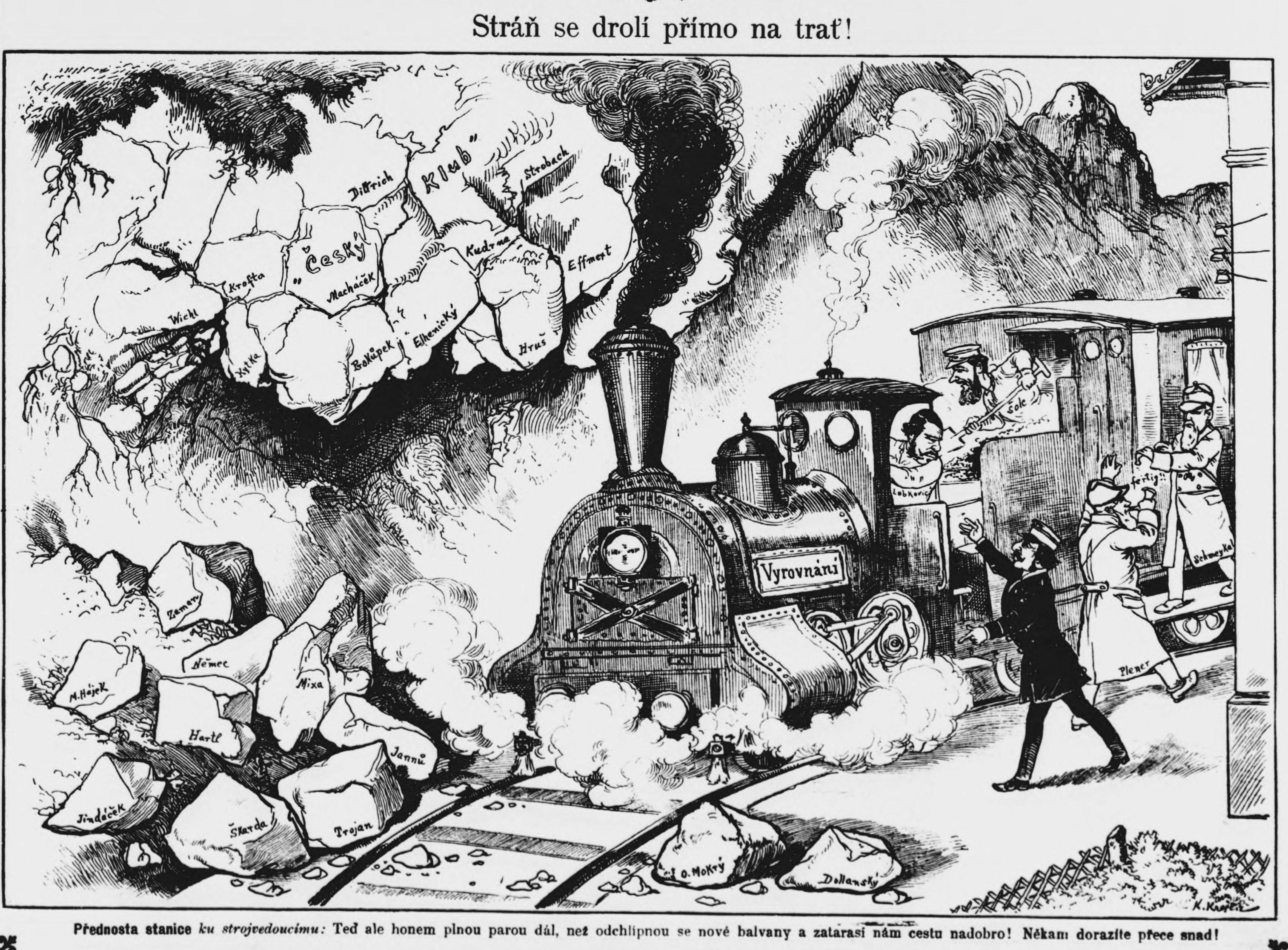 Karikatura komentující hrozící neúspěch punktací, jednání o česko-německém vyrovnání r. 1890. Zatímco Jiří Kristián Lobkowicz (zobrazen jako strojvedoucí), Jindřich Šolc (topič), Ernst von Plener (vlakvedoucí) a Franz Schmeykal (průvodčí) chtějí dohody prosadit, na trati se před nimi postupně hromadí kameny, znázorňující politické odpůrce.